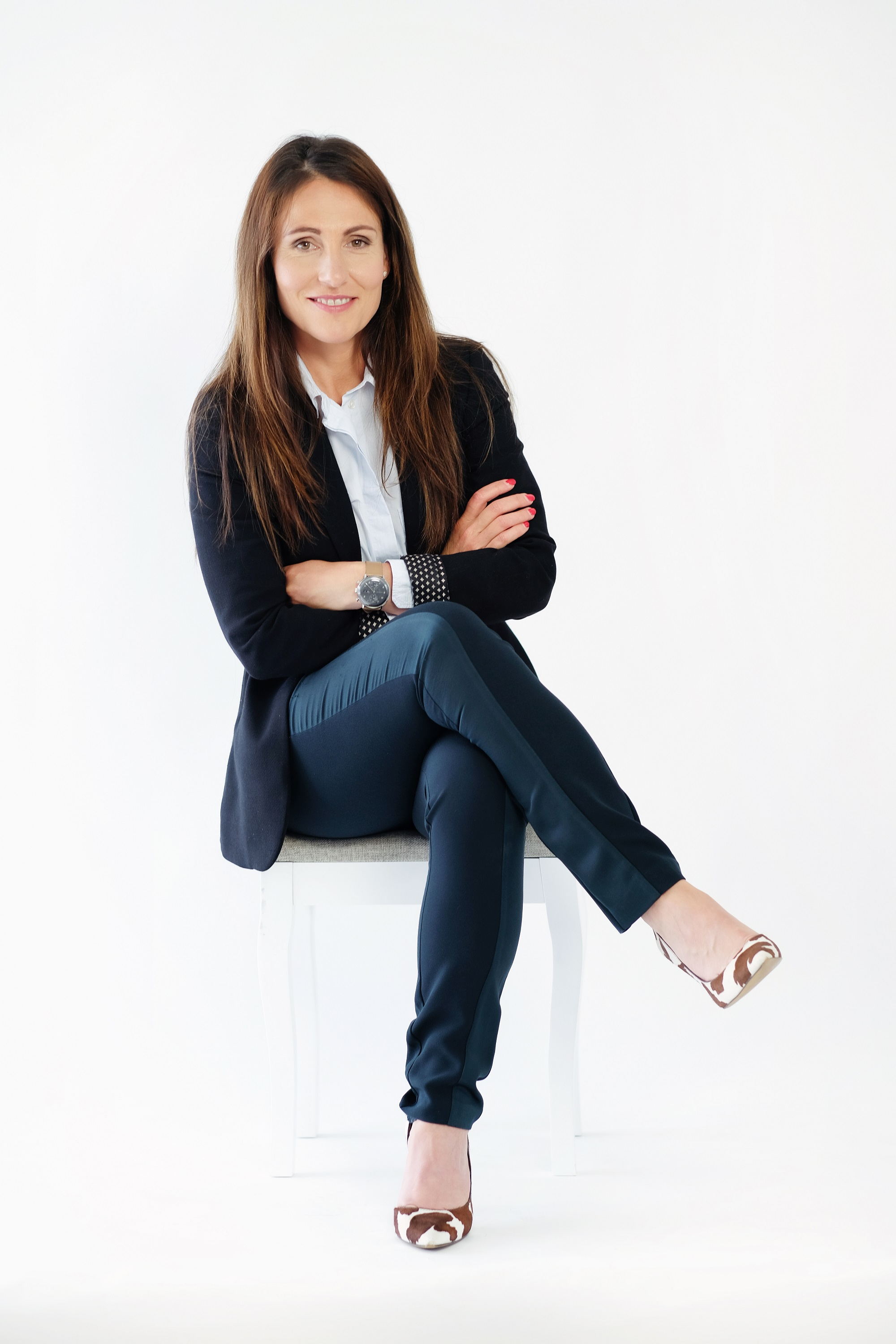 Andrea Pfeffer Ferklová PRIMÁTORKA MĚSTA KARLOVY VARY